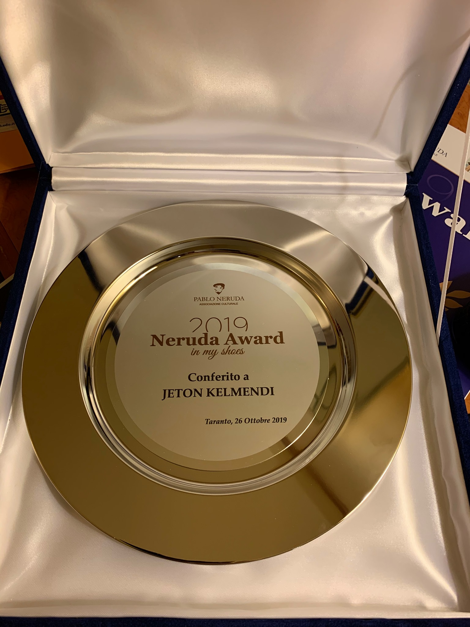 çmimi Neruda